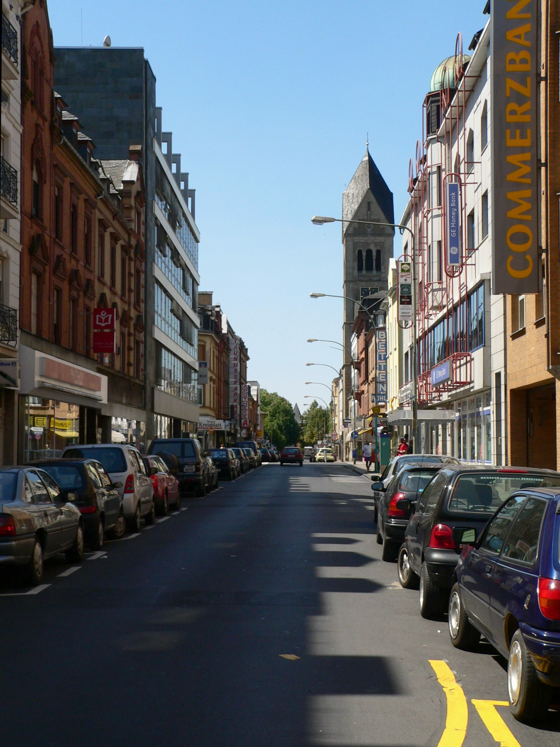 Die Hostatostraße in Frankfurt-Höchst